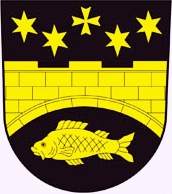 znak, Strunkovice nad Volyňkou, okres Strakonice